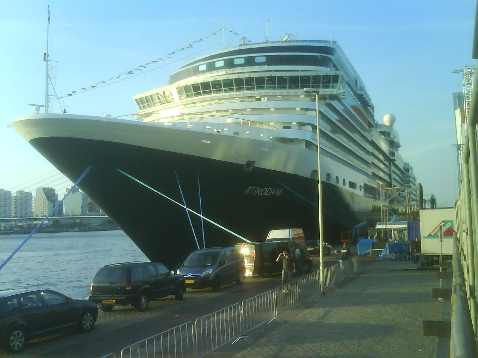 MS Eurodam Front